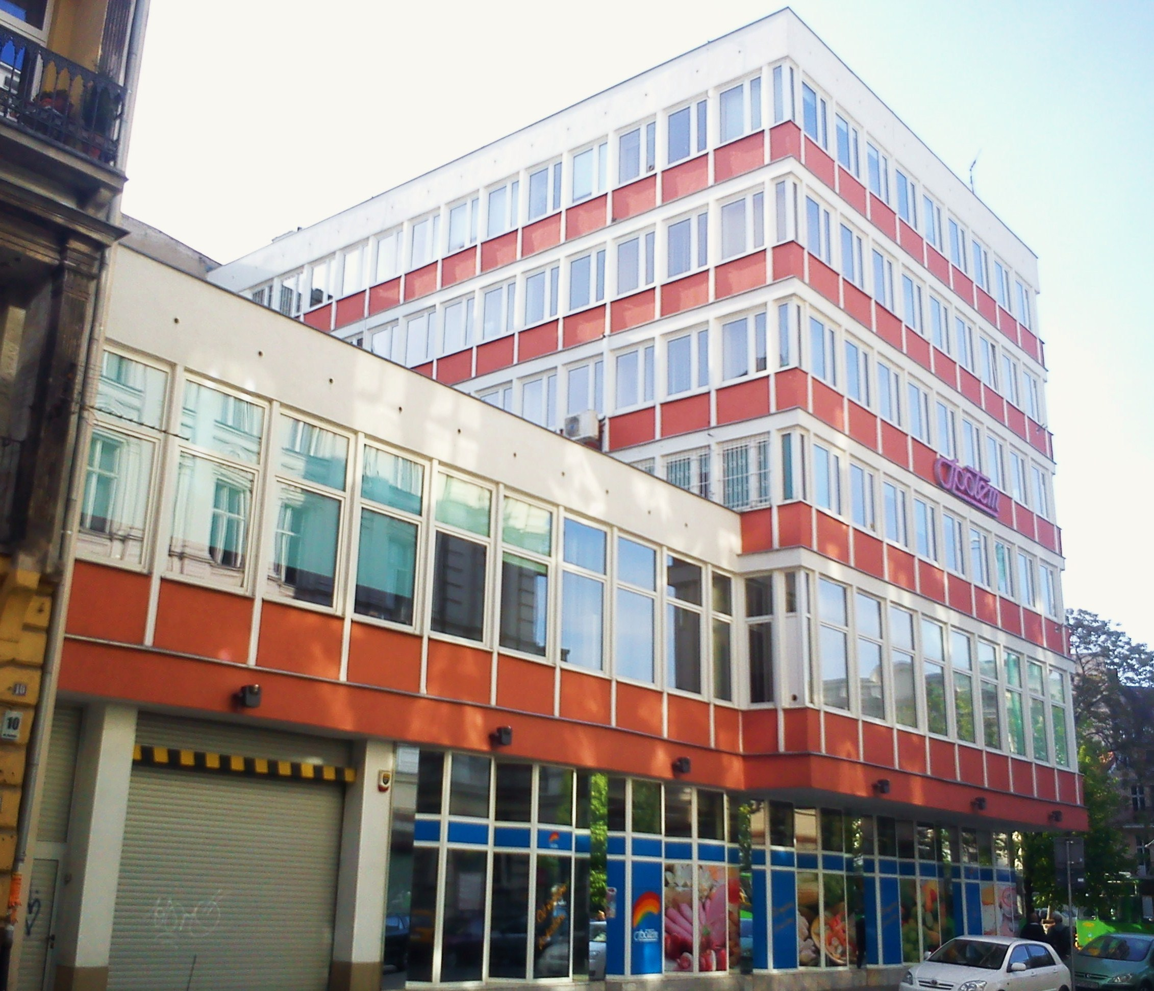 Delikatesy Kasia w Poznaniu od ul. Kantaka.